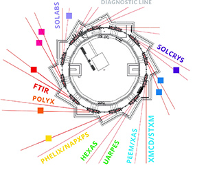 Istniejące oraz planowane linie badawcze w synchrotronie SOLARIS